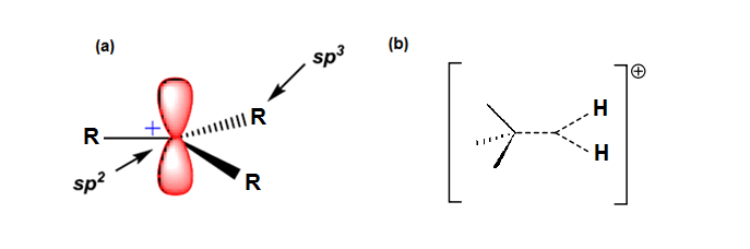 jui